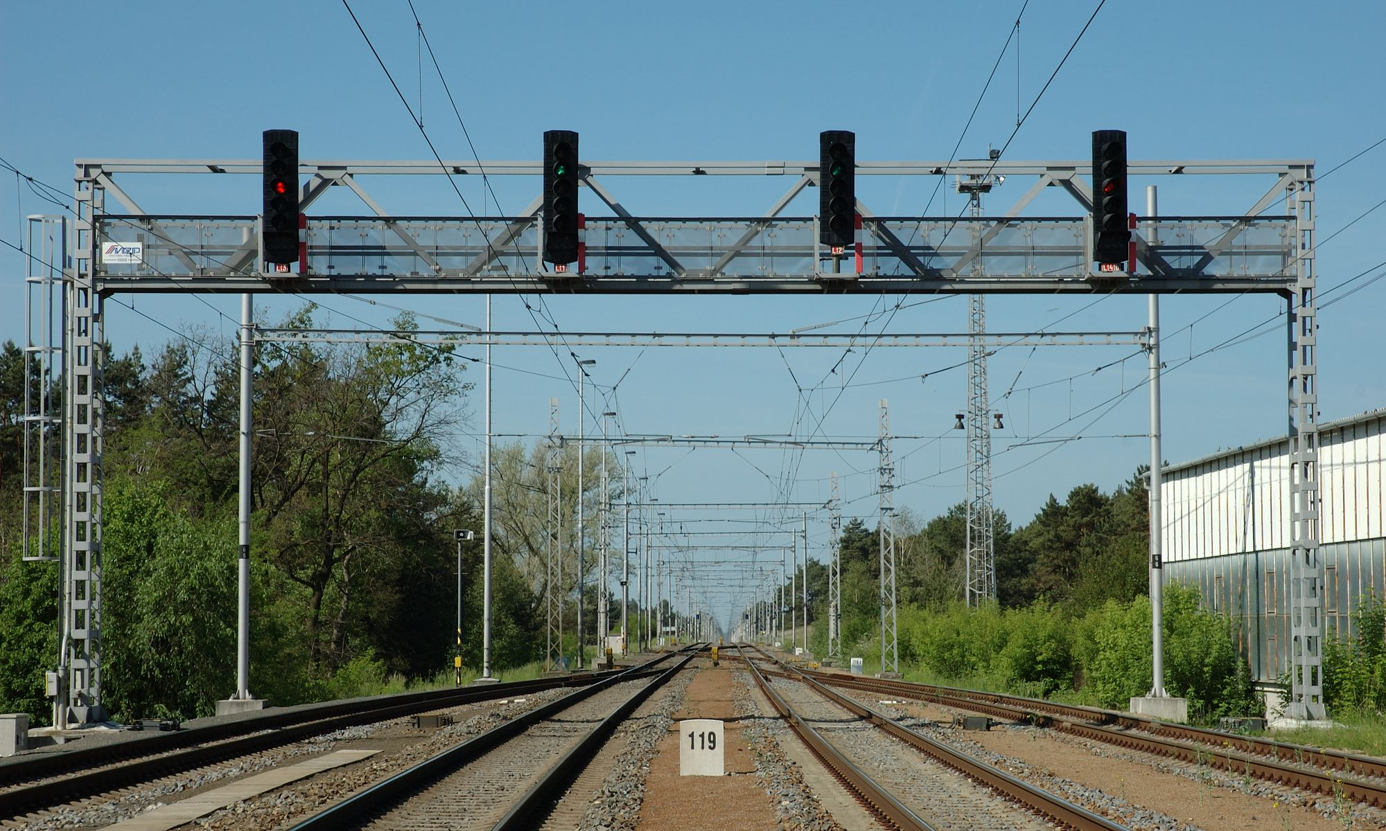 Návěstní lávka ve stanici Bzenec přívoz